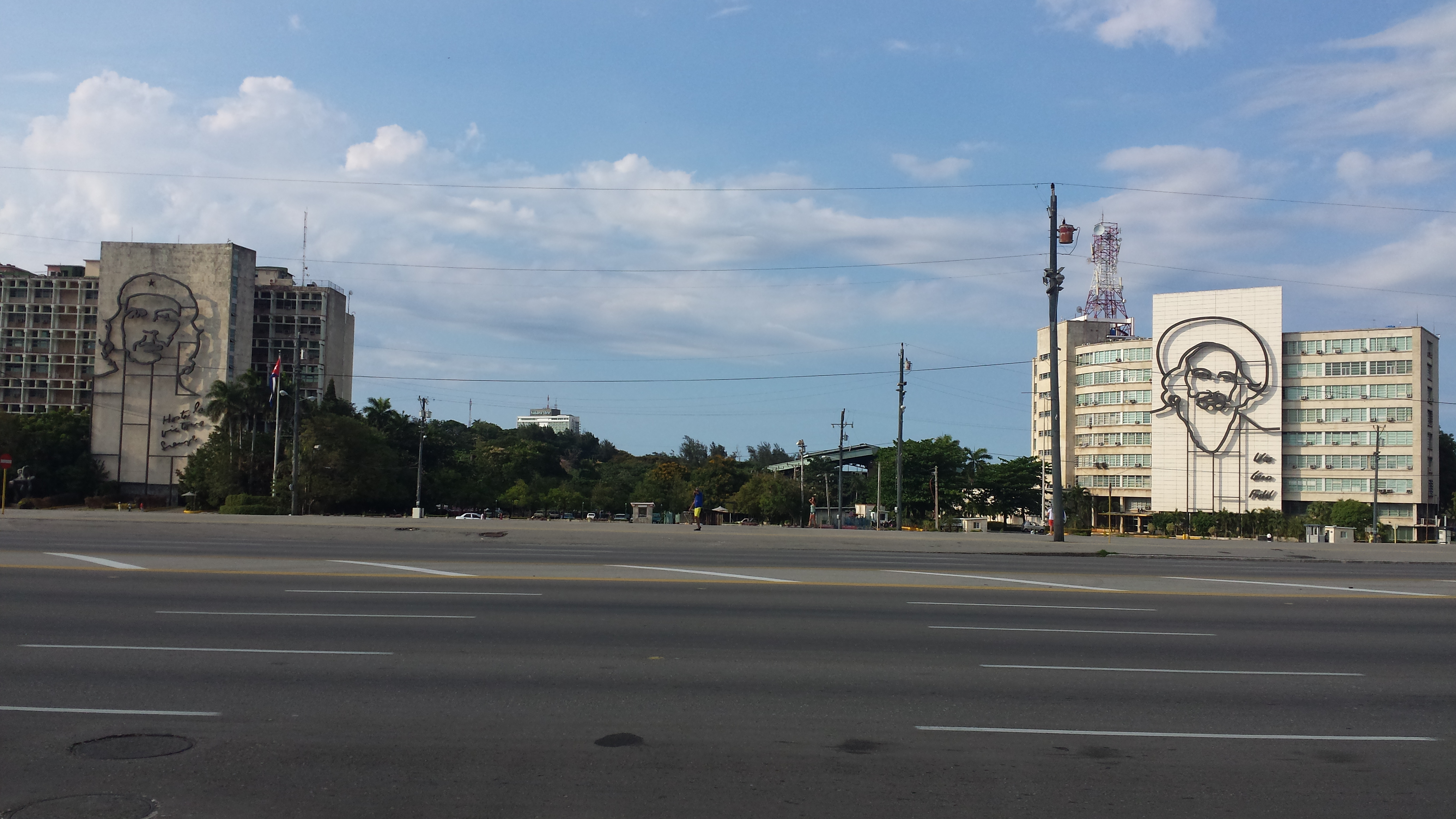 Vista de los monumentos dedicados a Ernesto Che Guevara (Izquierda) y Camilo Cienfuegos (Derecha). En la Plaza de La Revolución.